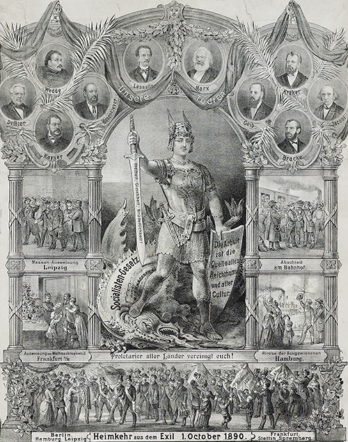 Plakat zur Beendigung des Sozialistengesetzes 1890